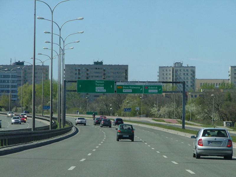 PL, Warsaw, Poland, Trasa Siekierkowska